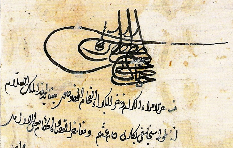 Kopf eines Fermāns von Cem Sultan aus dem Jahr 1481. Die imperialen Anspruch erhebende Tughra nennt ihn „Cem b. Meḥemmed Ḫān muẓaffer dāʾimā“.